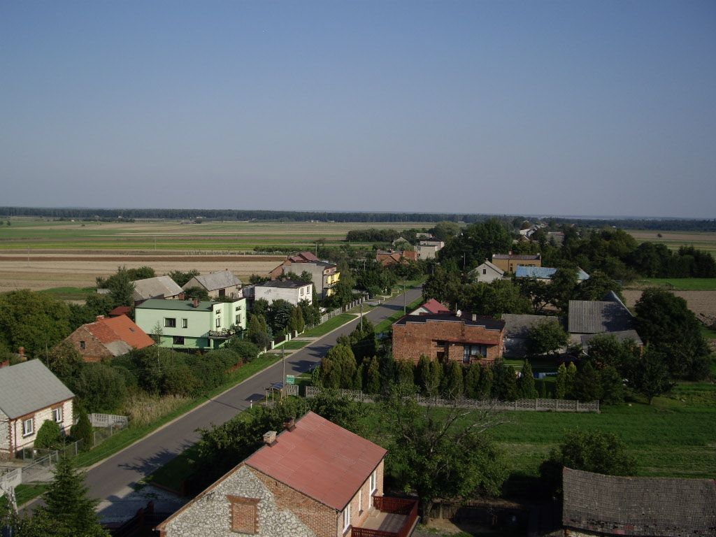 Ulica Częstochowska w Parzymiechach